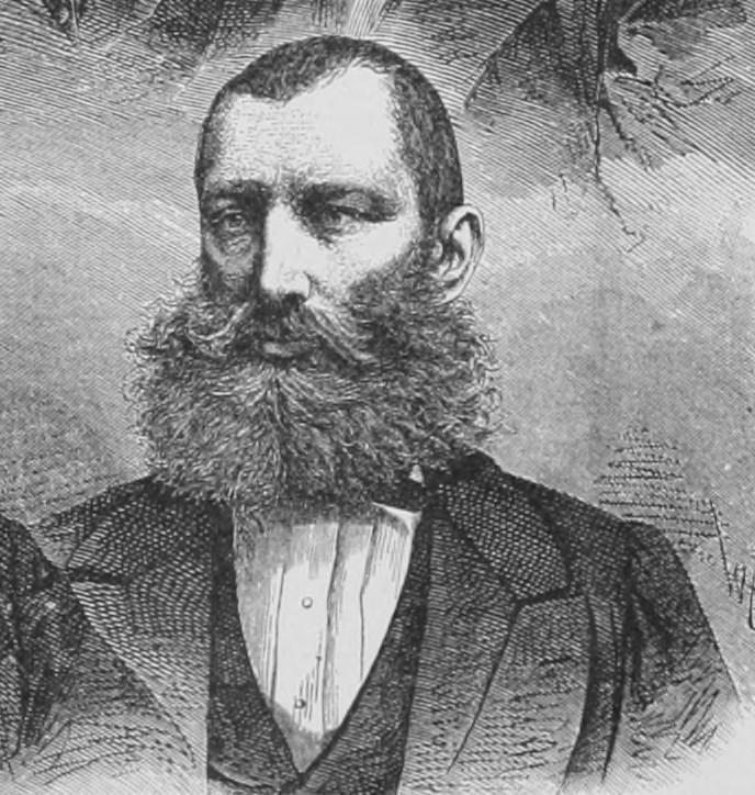 Radivoj Milojković